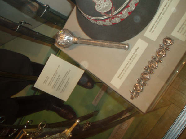 Der kleinere Marschallstab des Rydz-Smigly (Militärmuseum in Warschau)